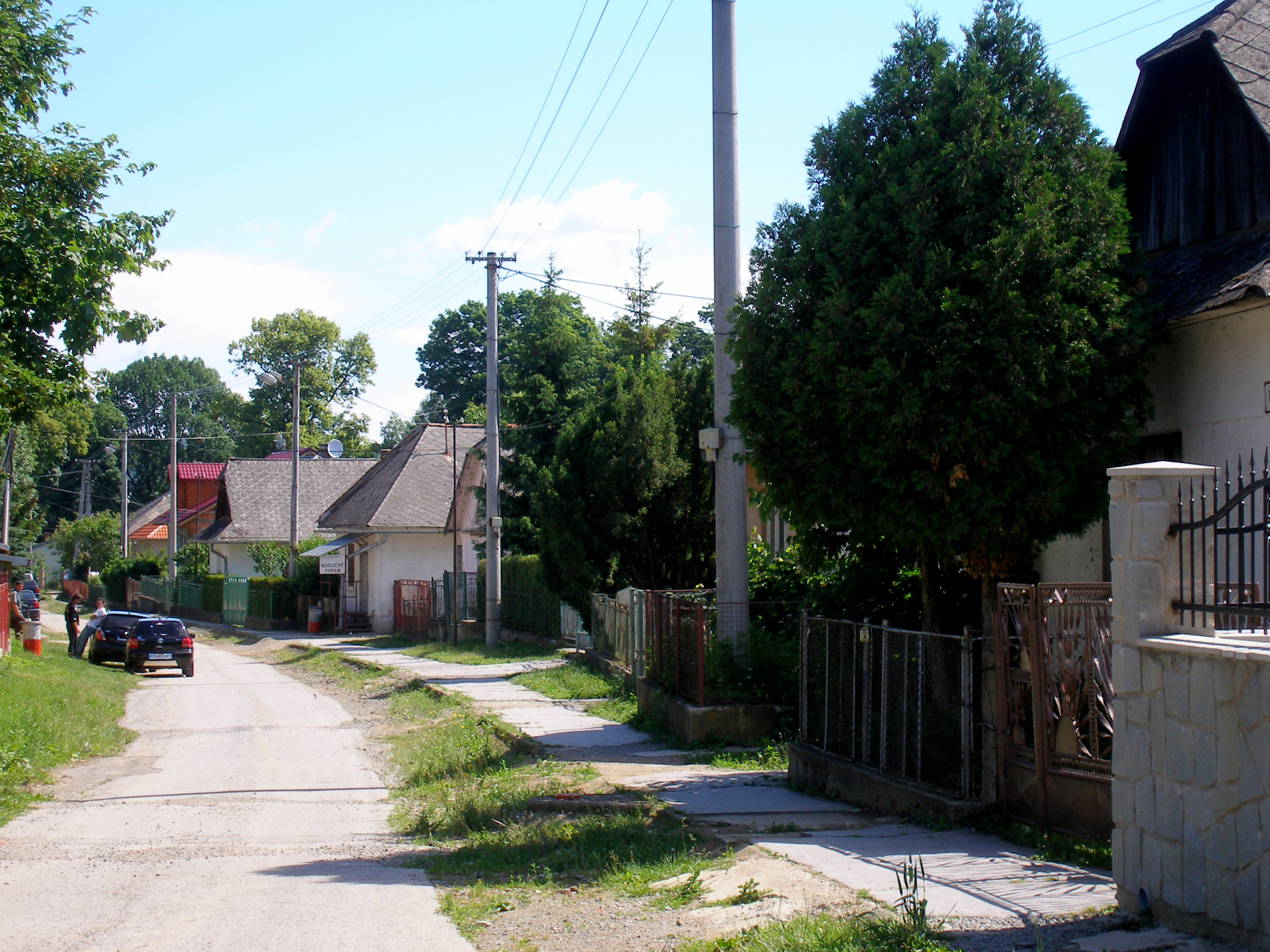 Obec Ostrovany okres Sabinov